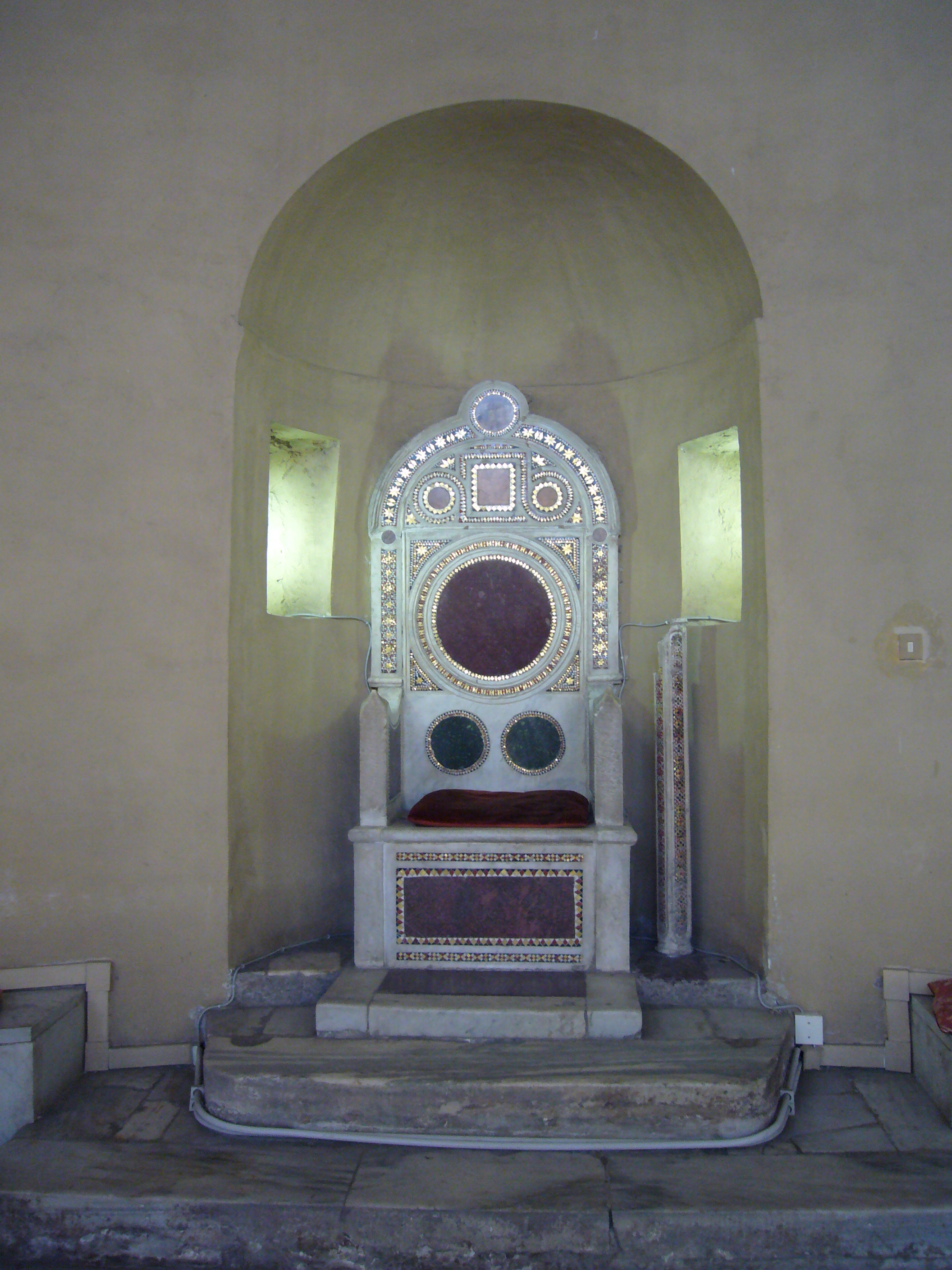 Roma, Santa Balbina: cattedra episcopale cosmatesca (XIII sec.)